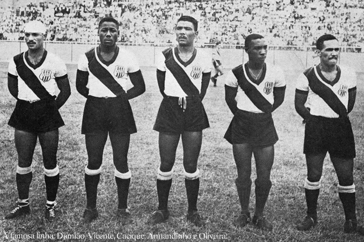 "A famosa linha". Formada por Damião, Vicente, Cacique, Armandinho e Oliveira. Outro fato curioso é a aparição do uniforme com a faixa transversal ao contrario do que é nos dias atuais.